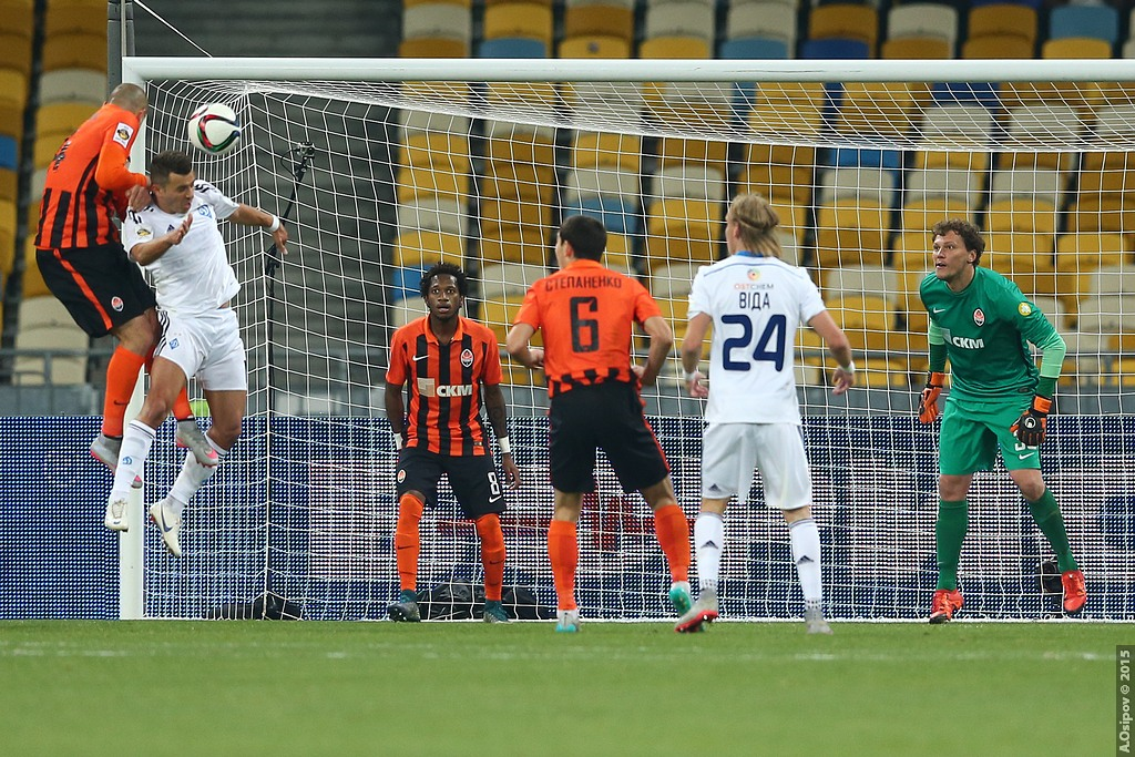 16.10.2015 г.Киев. НСК "Олимпийский". 11-й тур Лиги Пари-Матч. Динамо Киев - Шахтер Донецк - 0:3